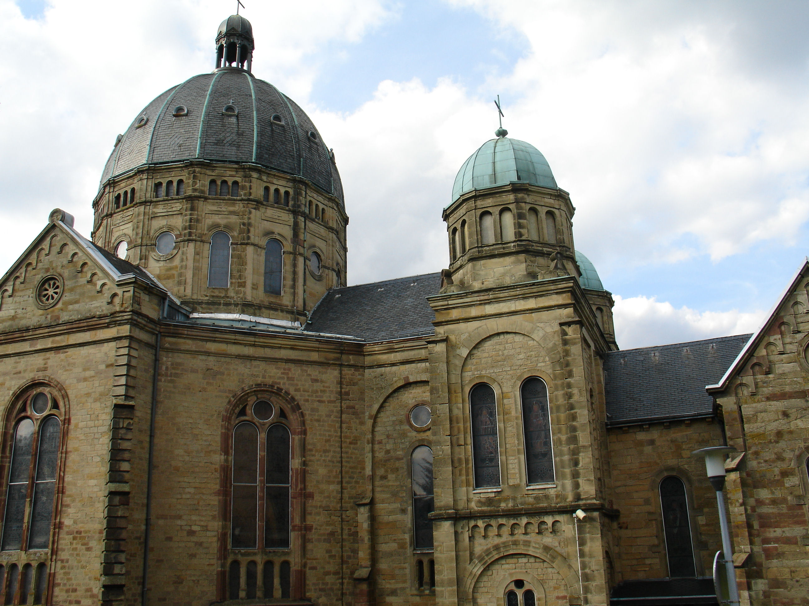 La Basilique Notre-Dame de Bons Secours de Saint-Avold.